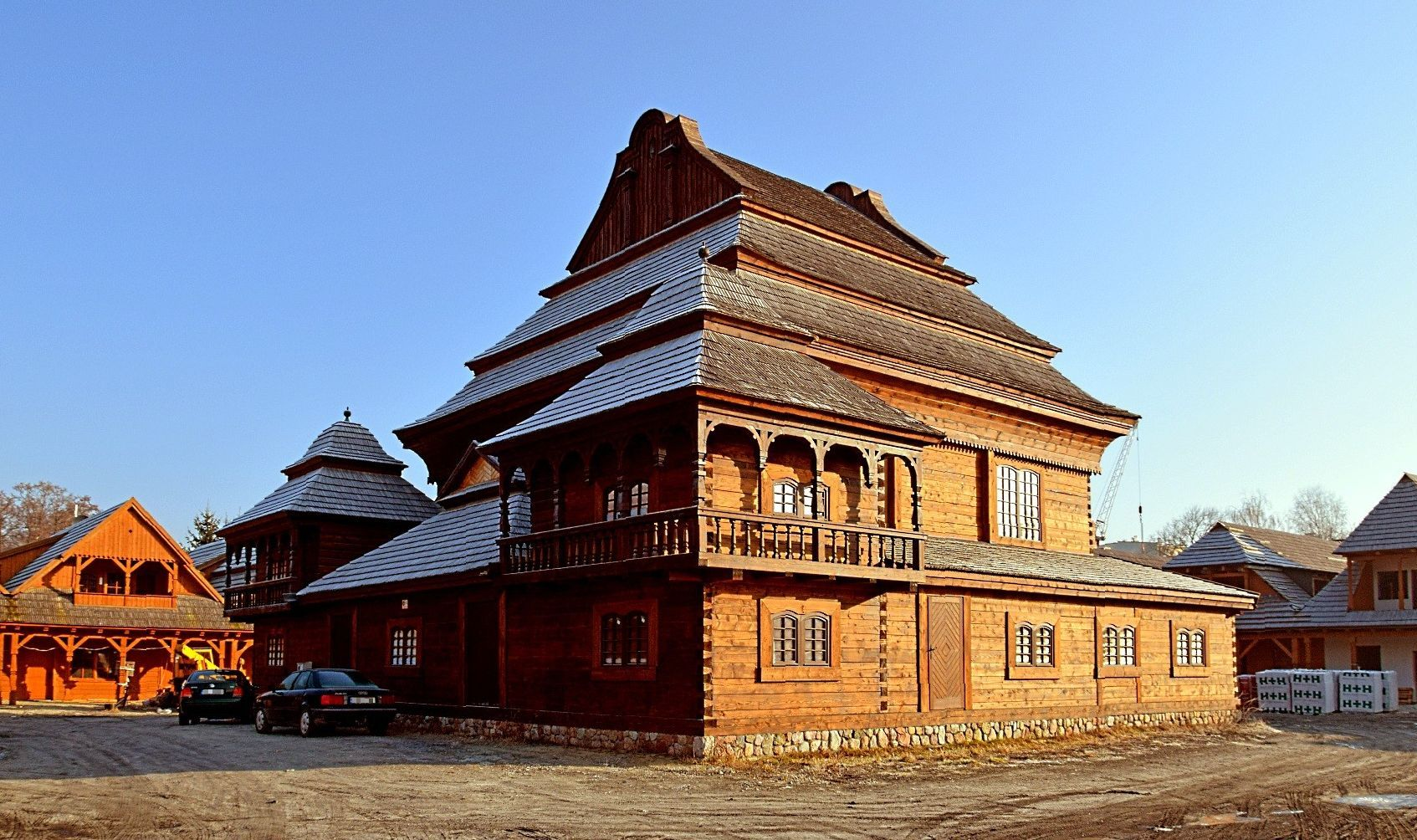 Inwestycja Miasteczko na Szlaku Kultur w Biłgoraju - budowa, stan prac na 2016 r. Rekonstrukcja synagogi z Wołpy.